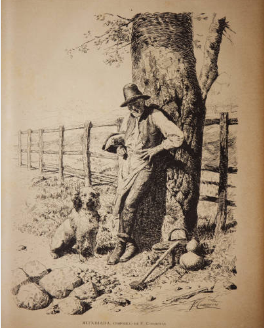 La Ilustració Catalana, número 129 28 Febrer de 1885 pàg. 57